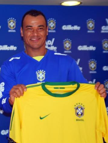 Jogador Cafu em 2010.